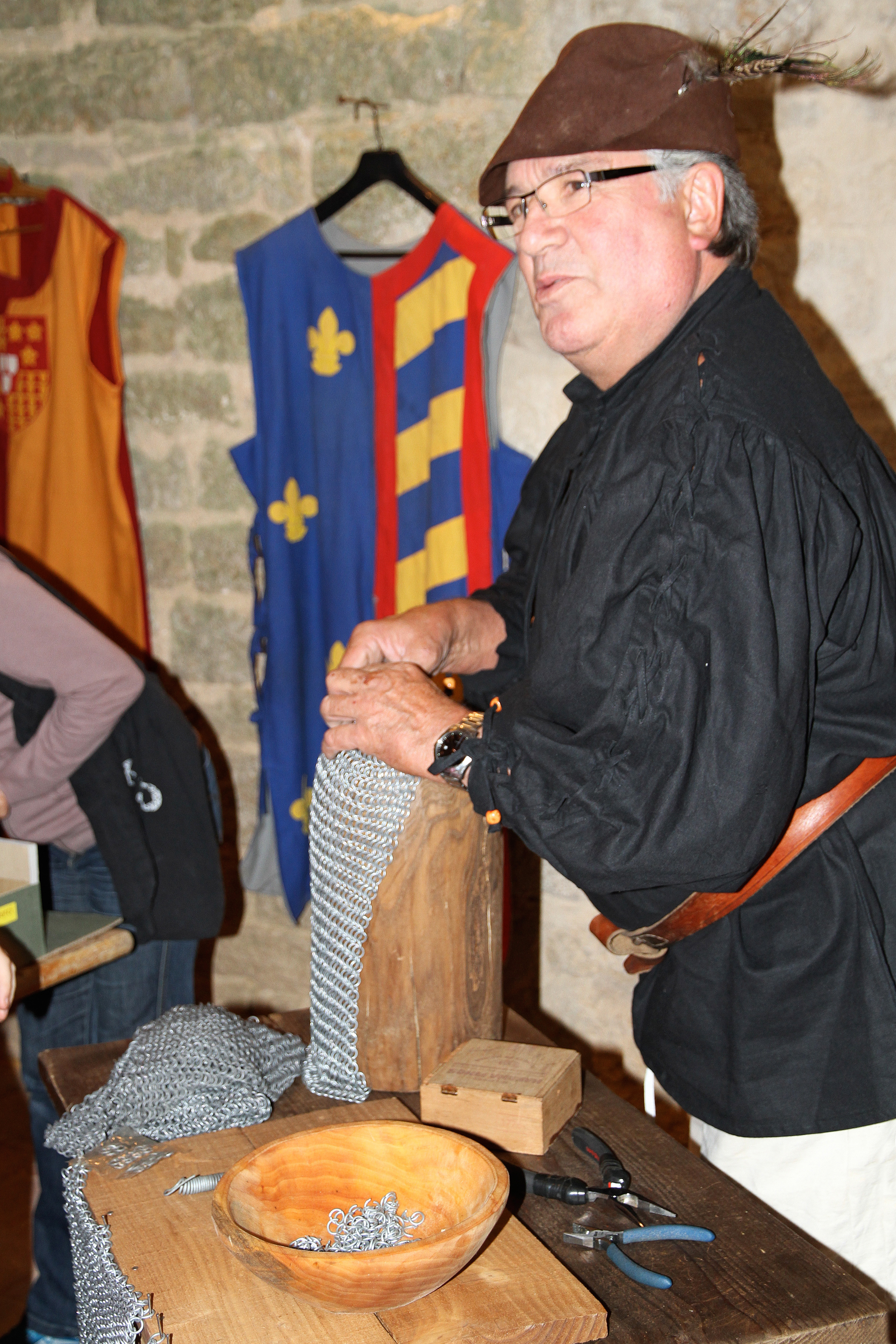 Artisan fabriquant des cotes de mailles au château de Montfort durant les Journées du Patrimoine